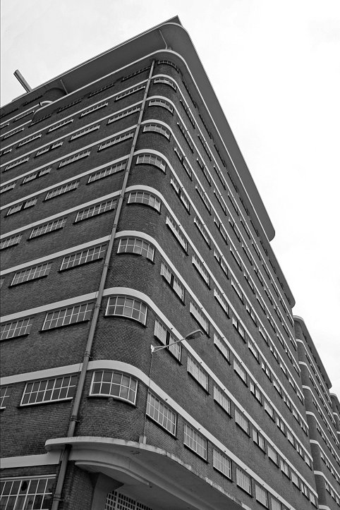 Strijp S, in Eindhoven; voormalig Philips fabrieken en kantoorgenbouwen